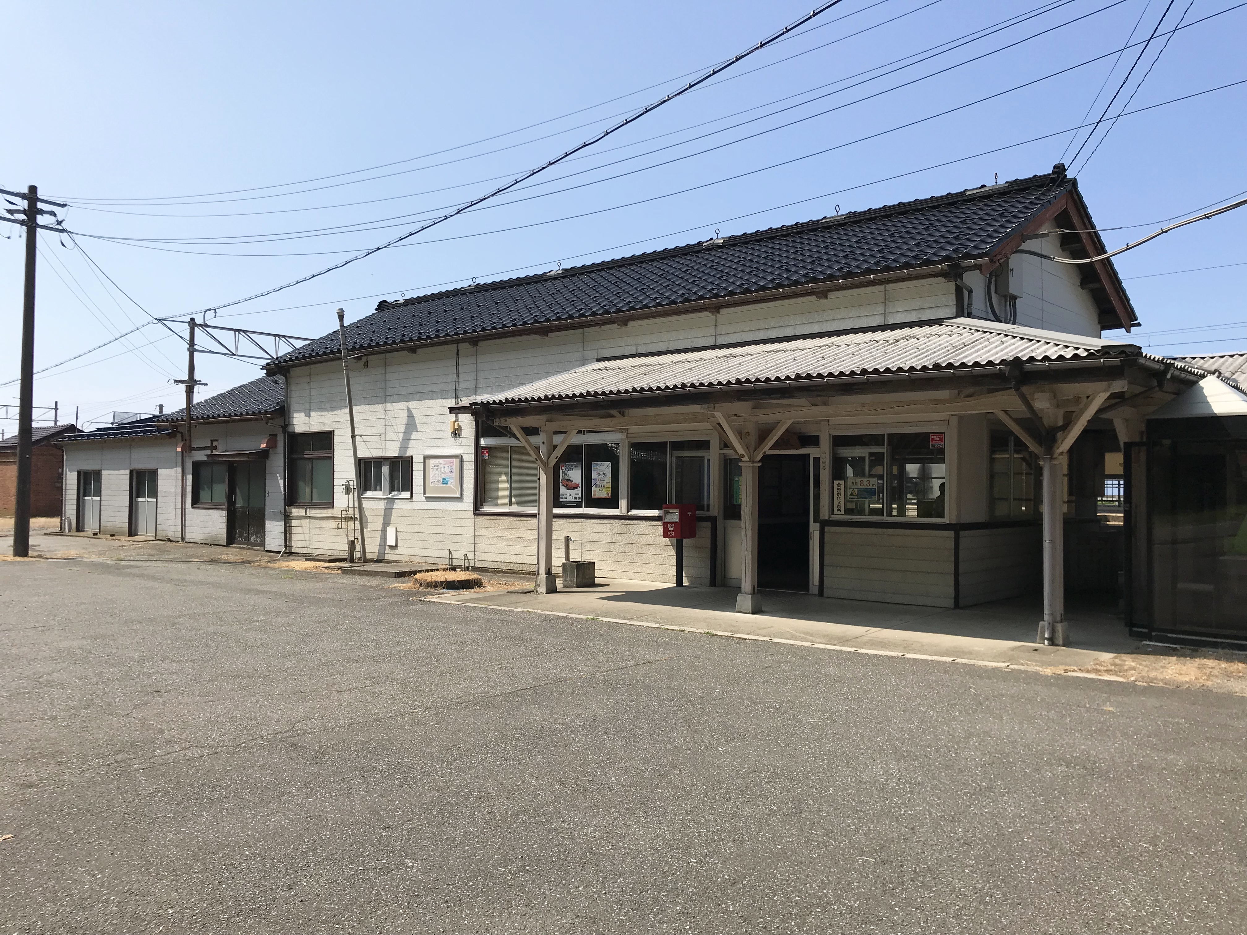 えちごトキめき鉄道日本海ひすいライン市振駅駅舎